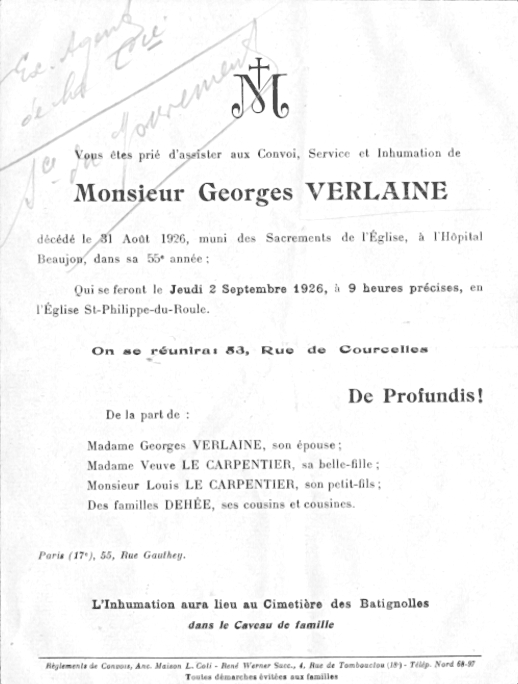 Faire part de décès de Georges Verlaine (1926)